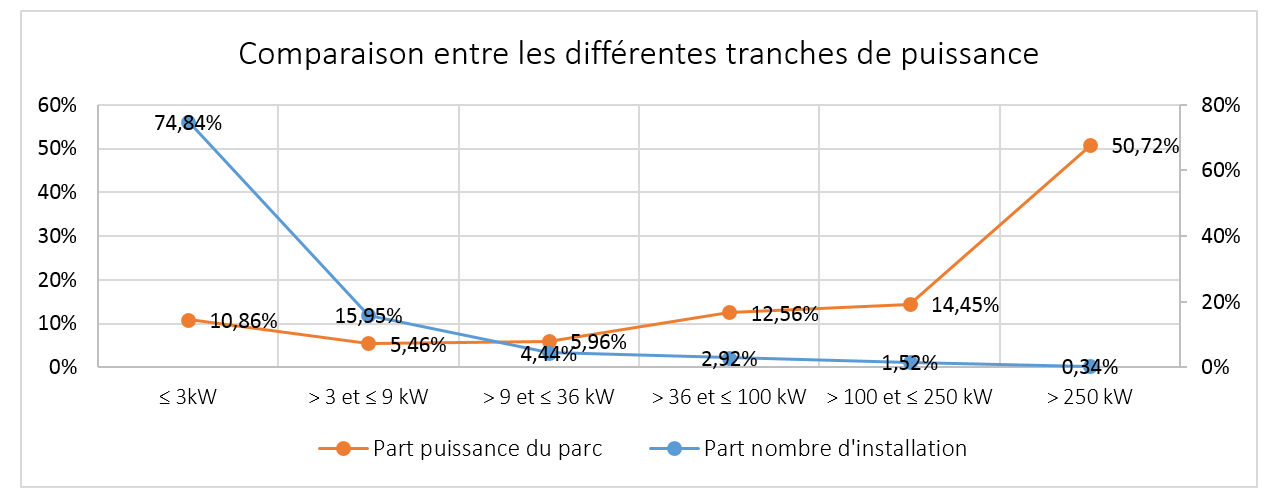 Ce sont les chiffres de la part de chaque tranche de puissance dans le parc photovoltaïque en France au 30/09/2016.